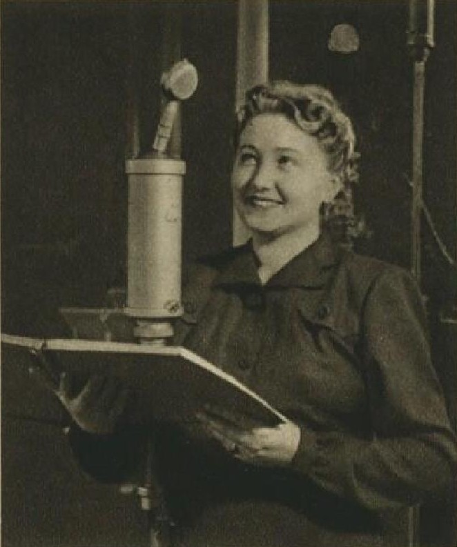 Maria Tauberová (1911-2003), česká operní pěvkyně, sopranistka Národního divadla v Praze